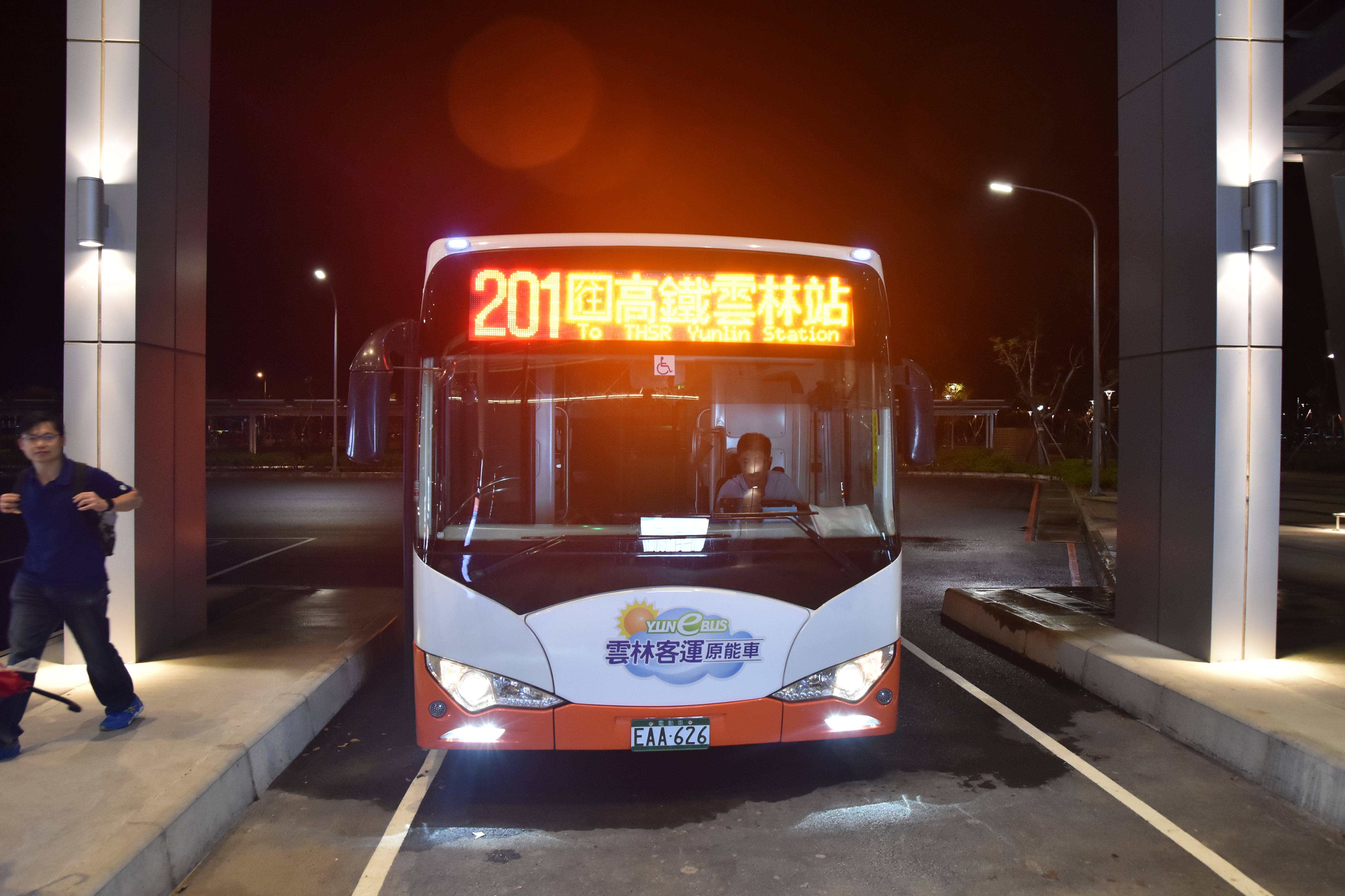 雲林客運電動公車EAA-626行駛高鐵快捷公車201路，停靠台灣高鐵雲林站。